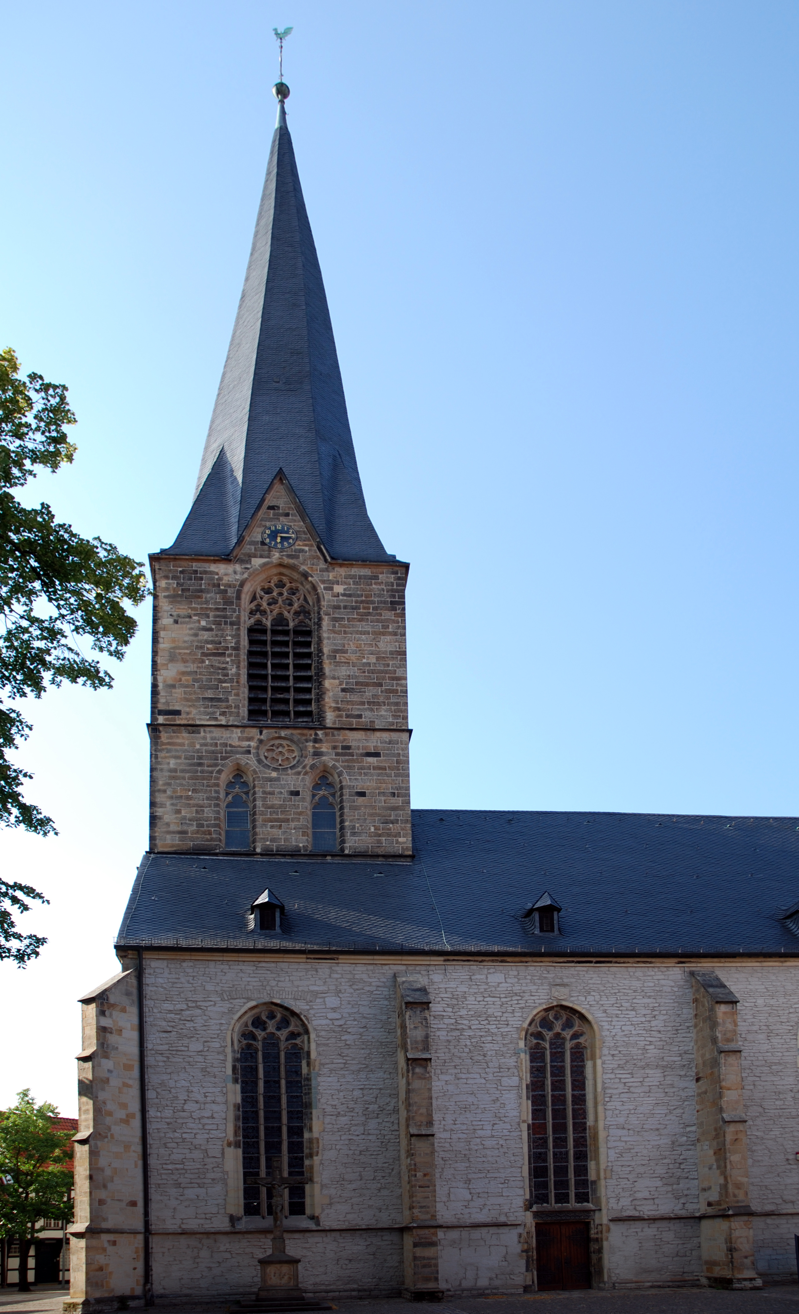 Werne, Kath. Pfarrkirche St. Christophorus, ehem. St. Johannes Bapt., Turm aus dem 15. Jh., Südseite